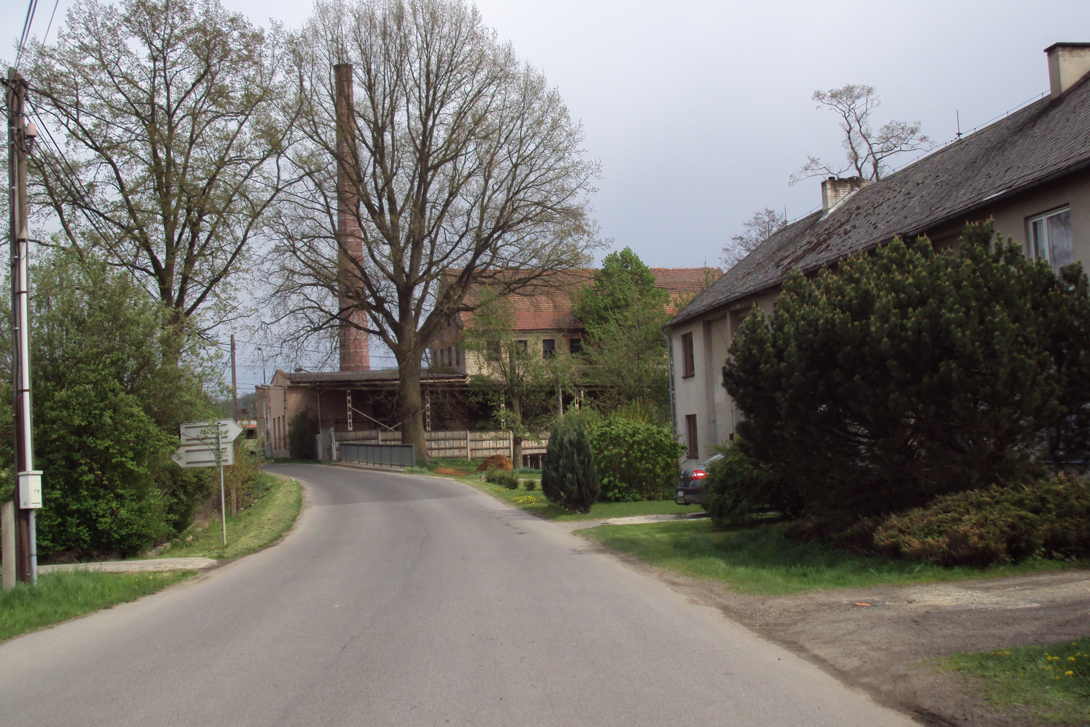 Bývalá továrna Mitop v obci Velký Grunov u Brniště